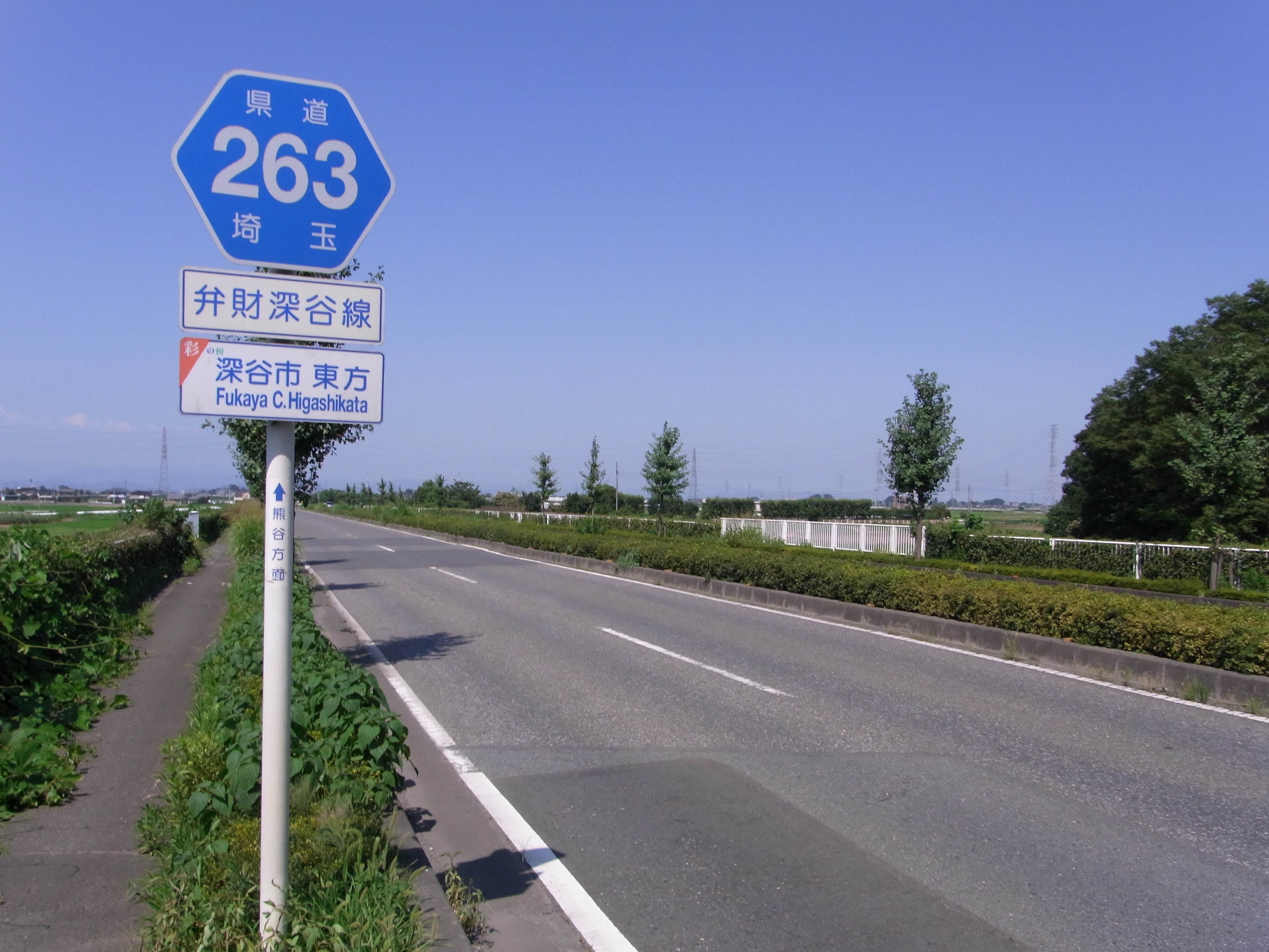 埼玉県道263号弁財深谷線 深谷市東方付近で撮影。